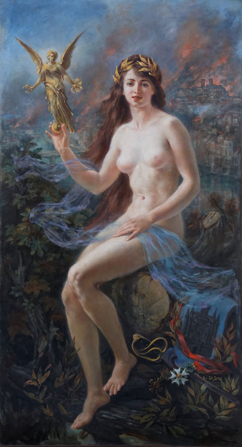 Huile sur toile, 200 x 111 cm Ville de Bois-Colombes Photo : Service de presse